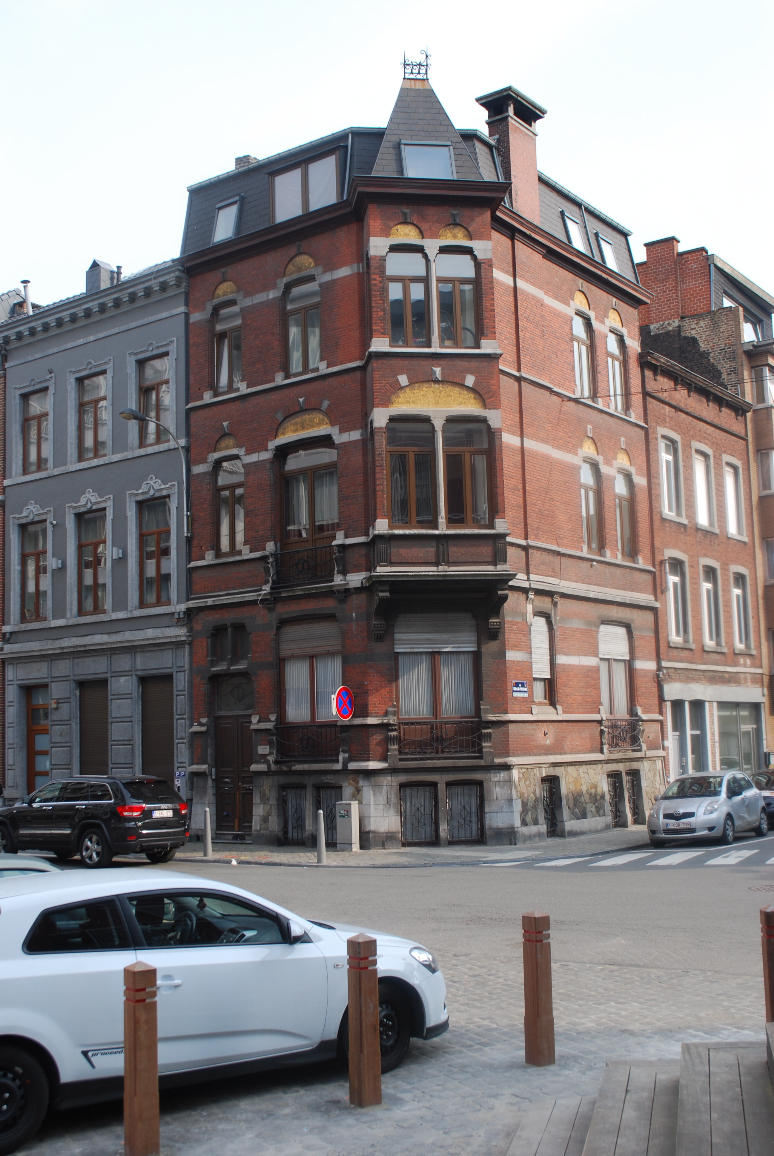 Vue du croisement des rues Jaspar, Lonhienne, Sur la Fontaine et Lambert le Bègue, dans le quartier de l'ancien béguinage à Liège.